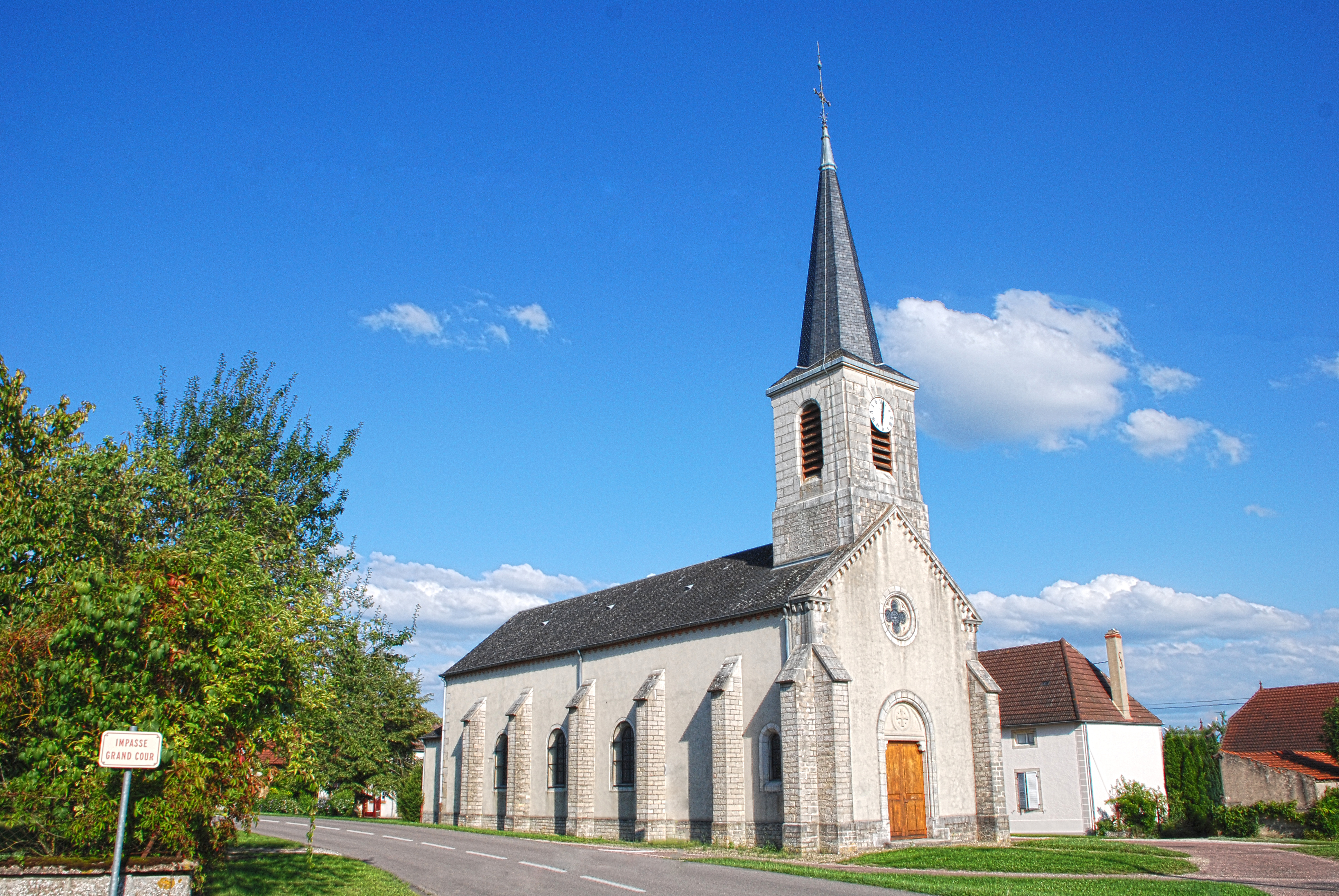 Église Saint Rémi, Commune de Montot - FRANCE